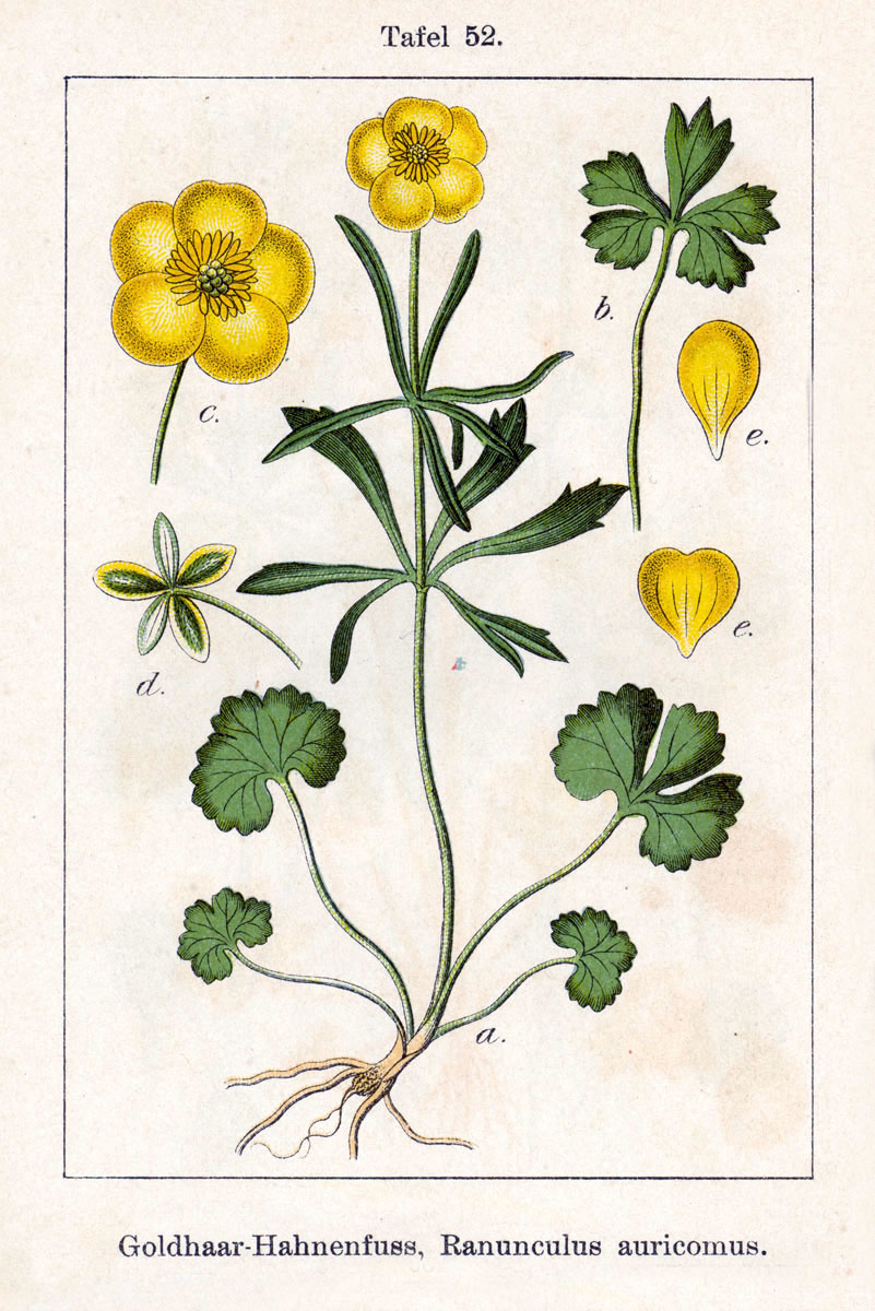 Ranunculus auricomus L. s. str. W. Koch 1933 an L. 1753 ?, syn. Ranunculus kochii Jasiewicz Original Description Goldhaar-Hahnenfuss, Ranunculus auricomus